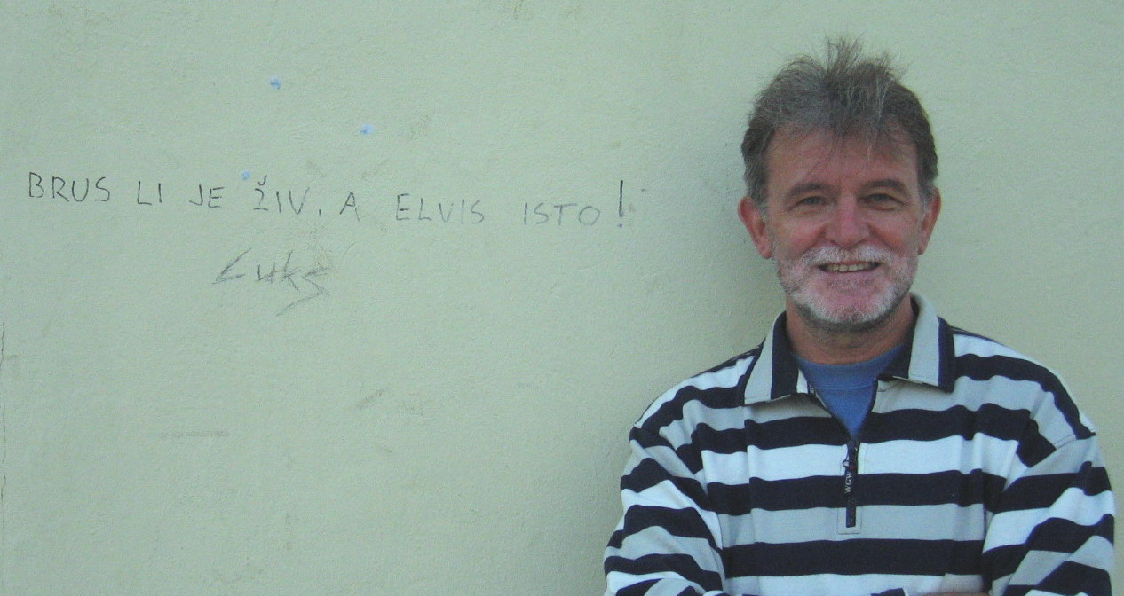 Veljko Despot, ljeto 2004. godine